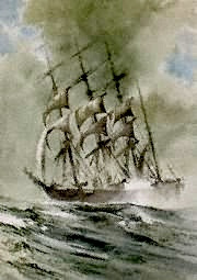 Pamir in schwerer See, Aquarell von Bruno Bergner. "Segelführung ungefähr wie am Tage des Untergangs", laut Horst Willners Beschreibung (S. 65) eines ähnlichen Photos in Willners Buch Pamir. ihr Untergang und die Irrtümer des Seeamtes (1991. Herford und Bonn: Verlag E.S. Mittler & Sohn GmbH).